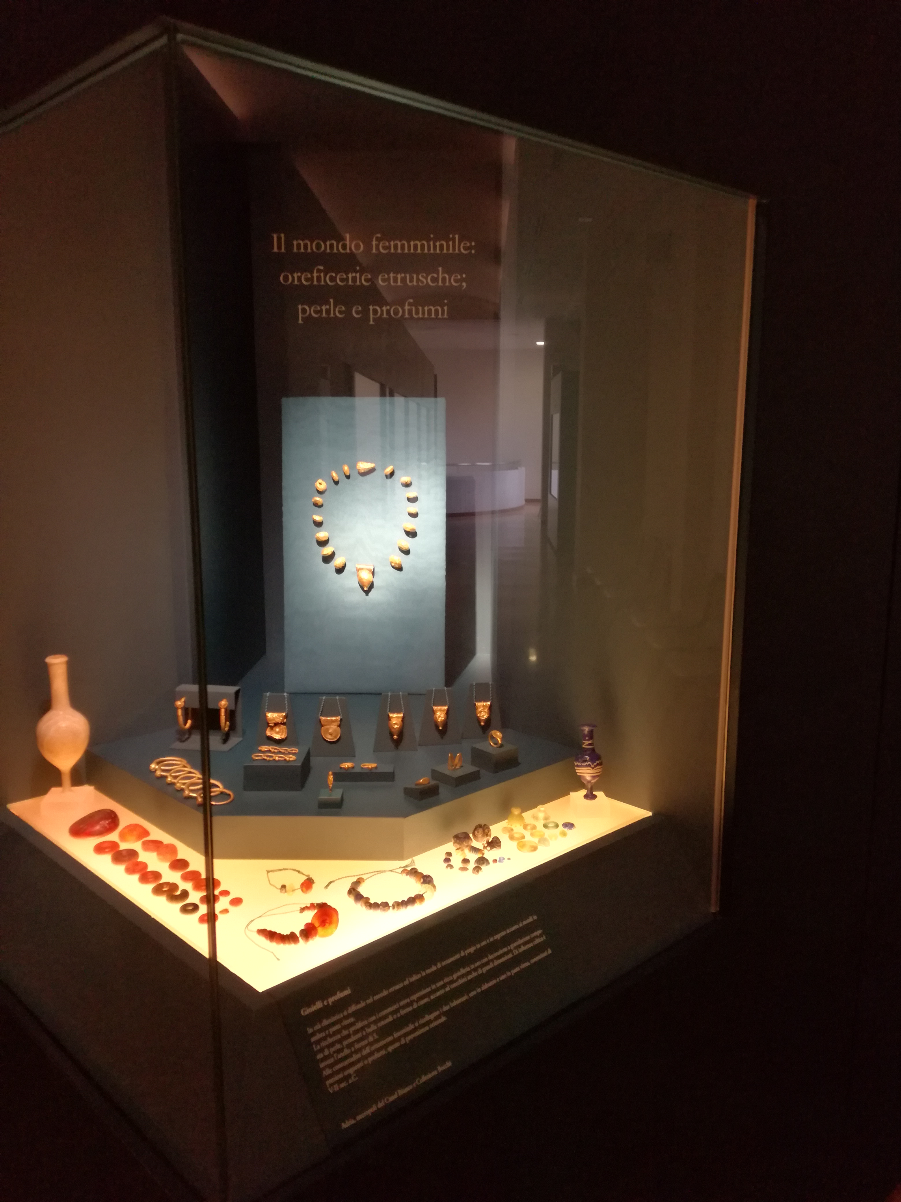 Vetrinetta con oreficeria etrusca situata all'interno del Museo Archeologico Nazionale di Adria